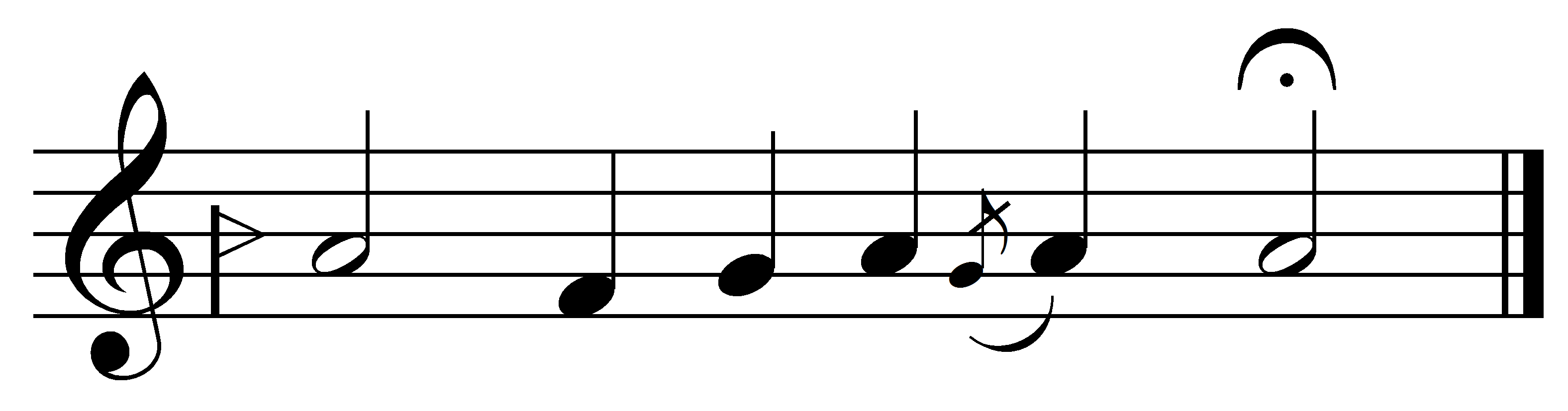 نمونه از فرود آواز همایون